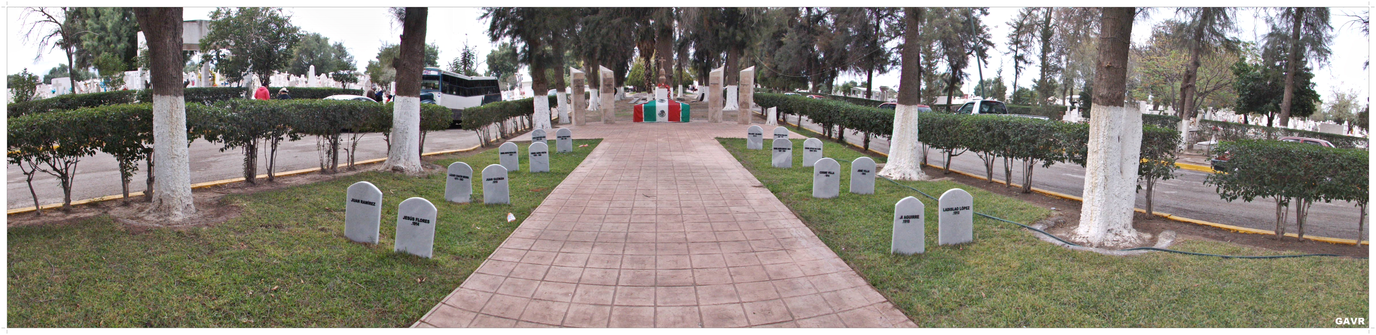 cementeriogp